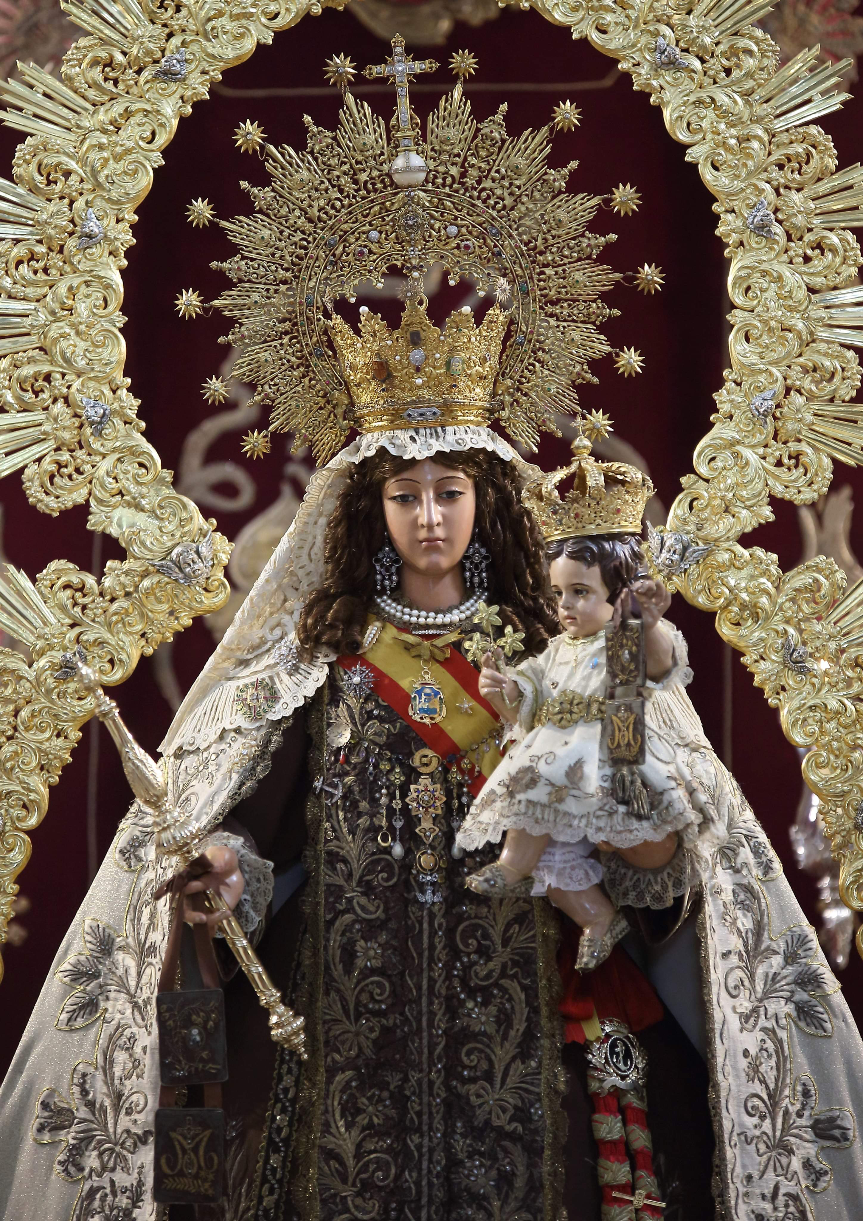 coronada